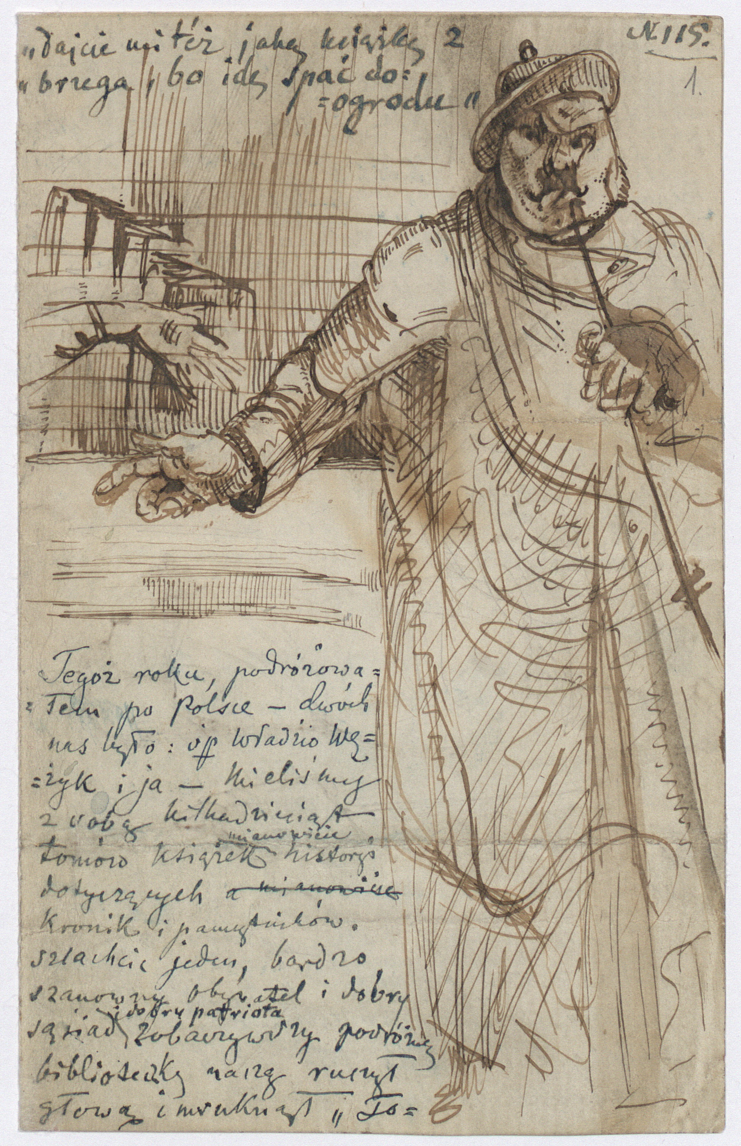 Kartka z "Pamiętnika podróżnego" C.K. Norwida